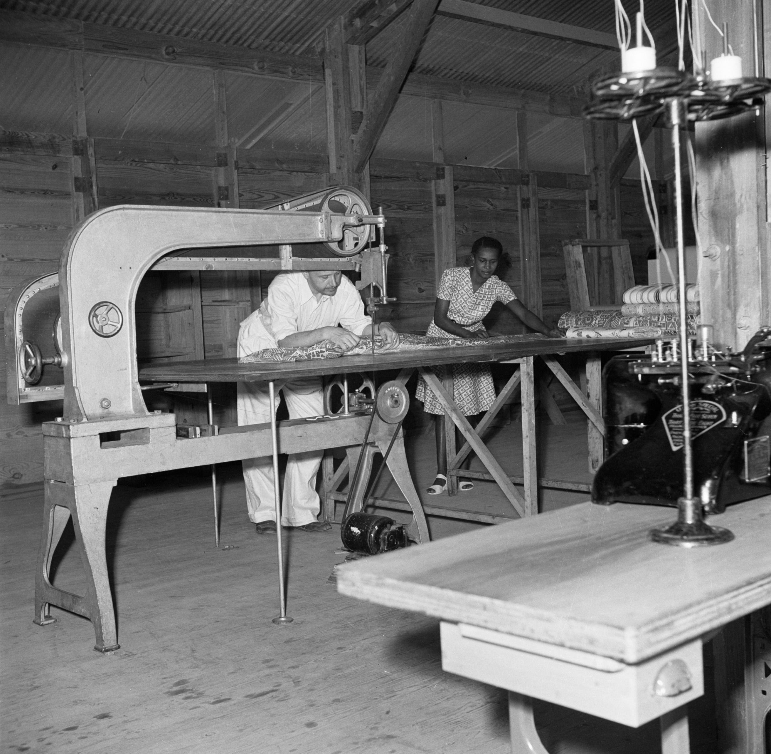 Collectie / Archief : Fotocollectie Van de Poll Reportage / Serie : Reis naar Suriname en de Nederlandse Antillen Beschrijving : Een naaiatelier voor bedrijfskleding op Bonaire Datum : 1947 Locatie : Bonaire, Nederlandse Antillen Trefwoorden : kledingindustrie Fotograaf : Poll, Willem van de, [onbekend] Auteursrechthebbende : Nationaal Archief Materiaalsoort : Negatief (zwart/wit) Nummer archiefinventaris : bekijk toegang 2.24.14.02 Bestanddeelnummer : 252-8409